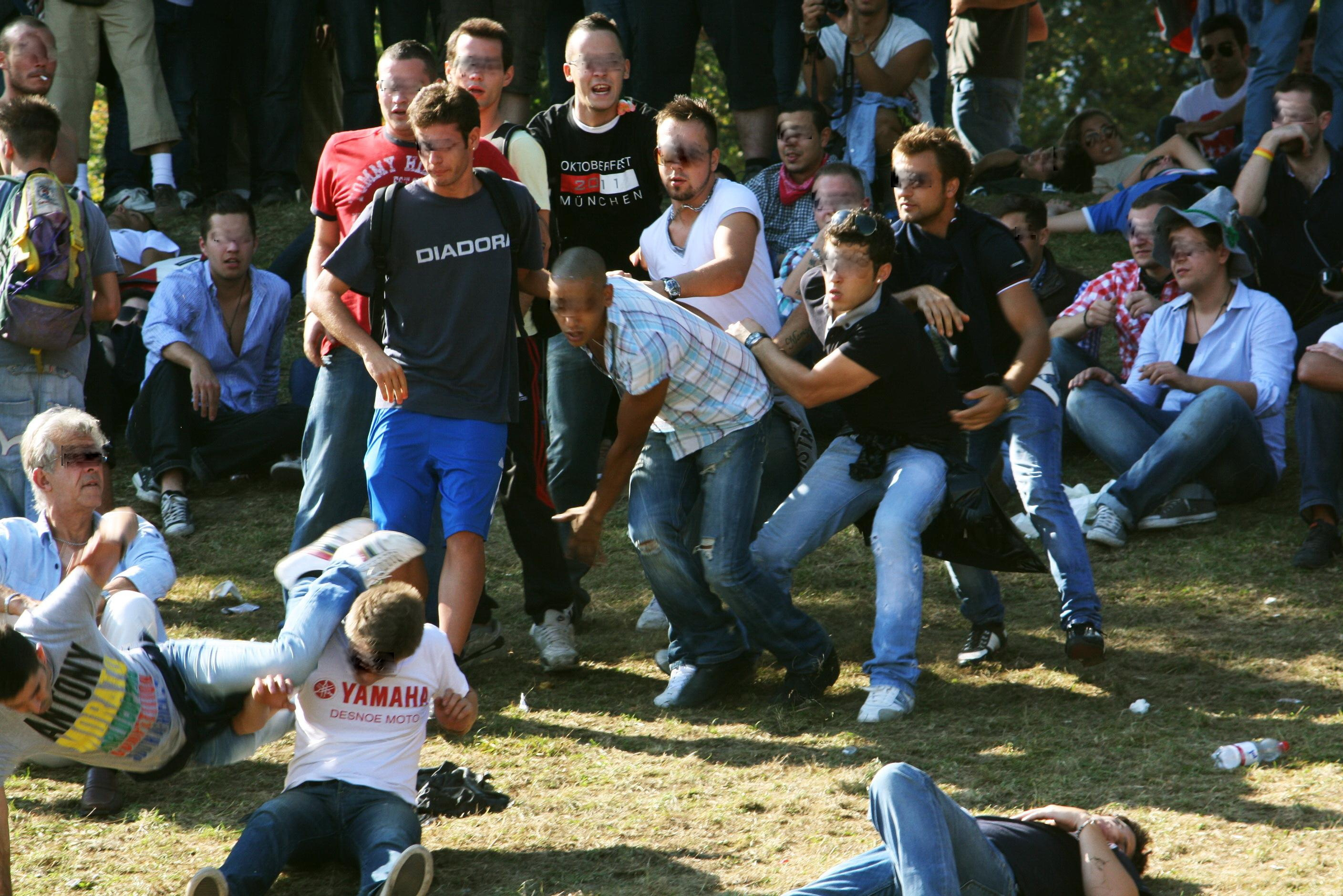 Schlägerei am Rande des Oktoberfestes 2011.